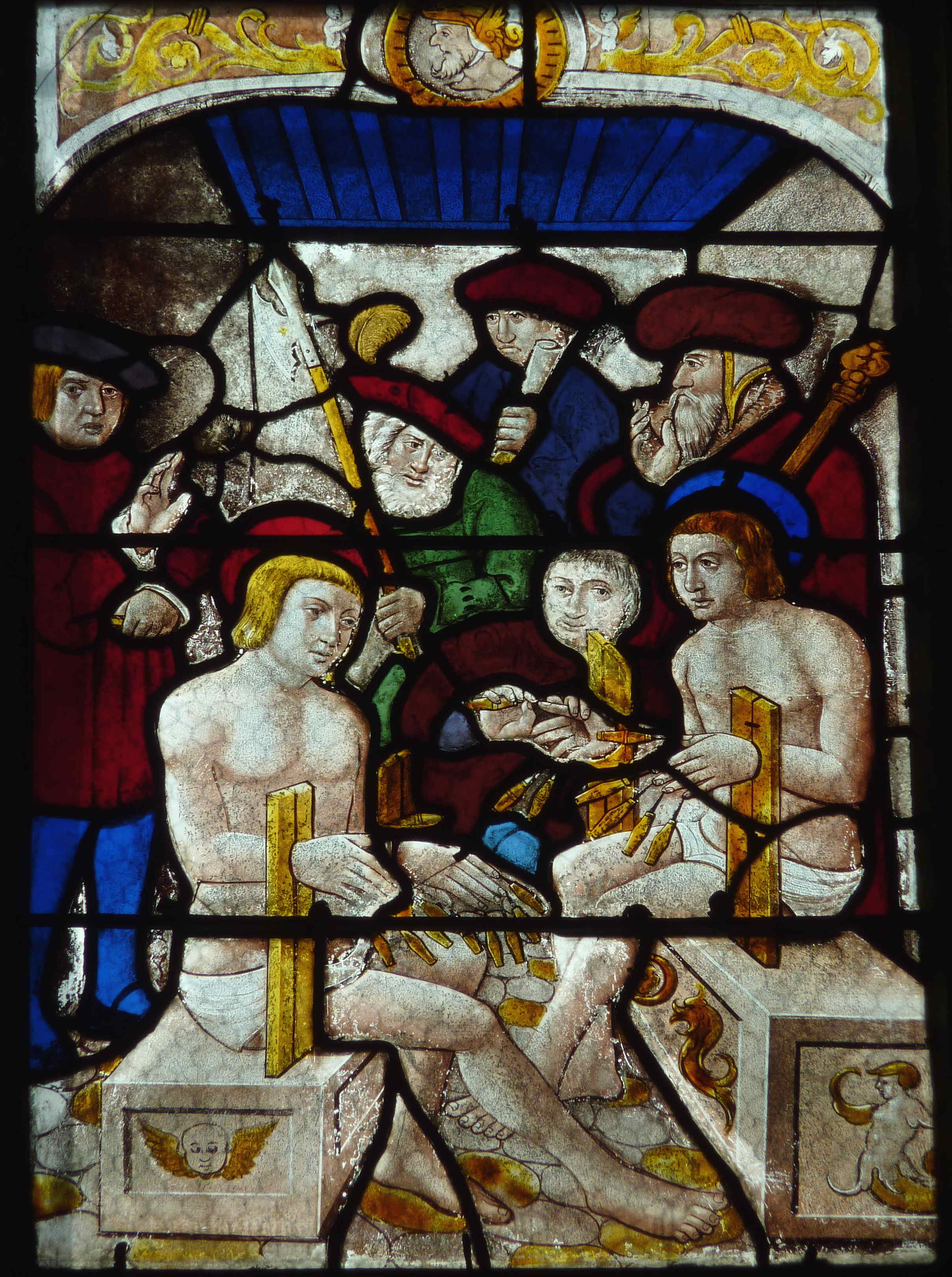 Katholische Kirche Saint-Pierre in Dreux im Département Eure-et-Loir (Centre-Val de Loire/Frankreich), Bleiglasfenster aus dem 16. Jahrhundert in der Kapelle Saint-Crépin und Saint-Crépinien; Darstellung: Martyrium der Brüder Crispinus und Crispinianus (Ausschnitt)